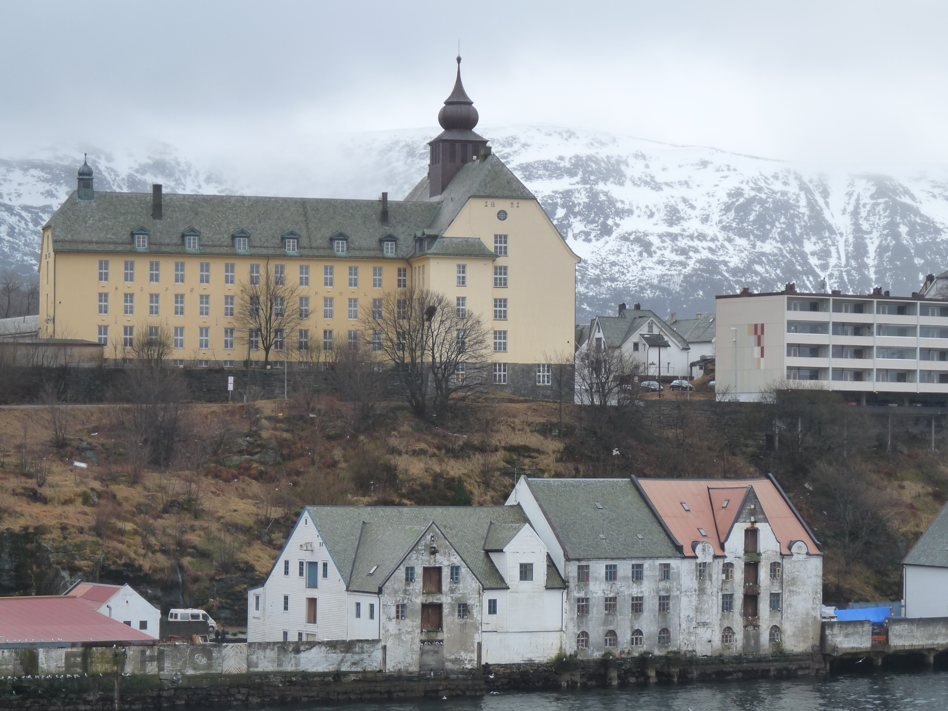 Ålesund: Aspøy Skole (Aspøy School), built 1919-1922